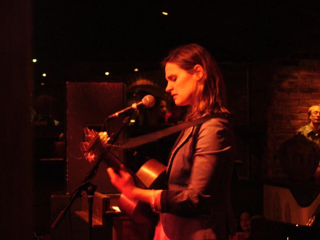 Madeleine Peyroux